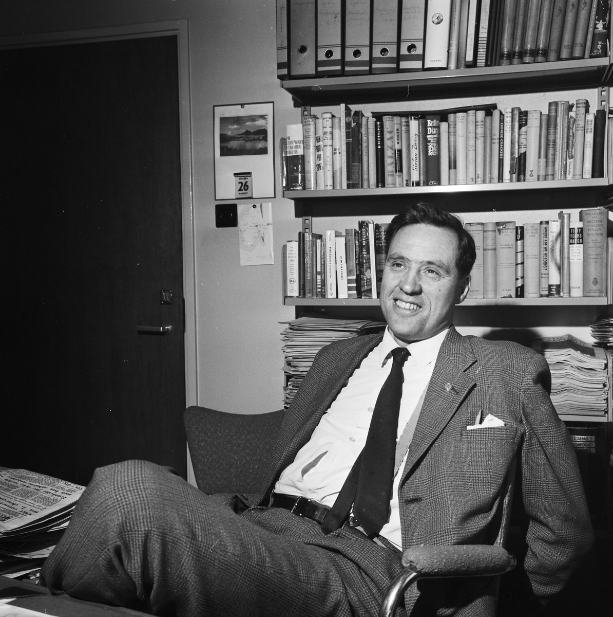 Halfdan Hegtun på Marienlyst, 1964